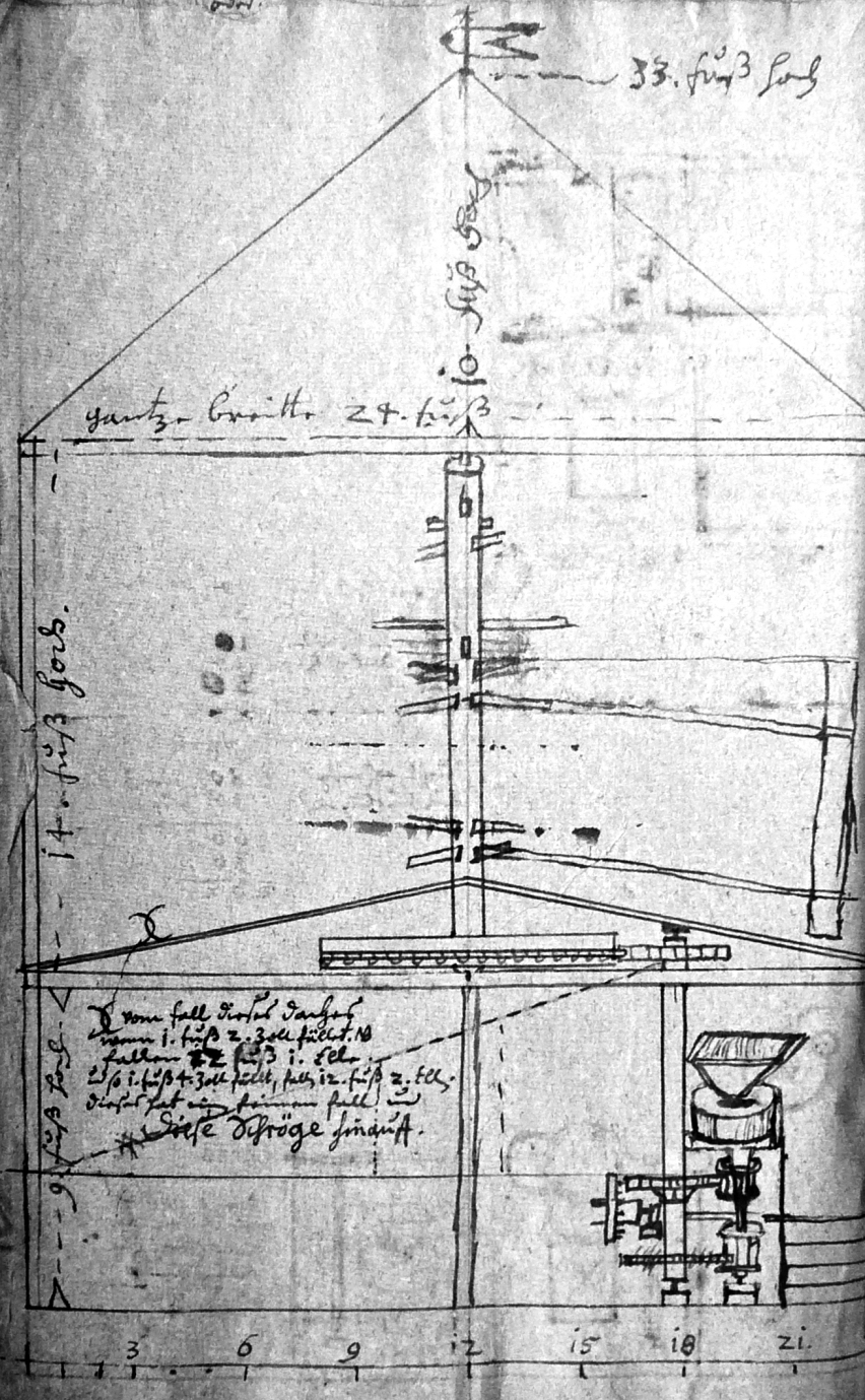 Skizzen mit Entwurf der Alten Mühle in Fürstenberg